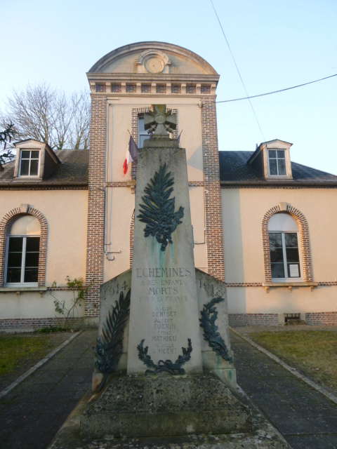 Monument aux morts d'Echemines